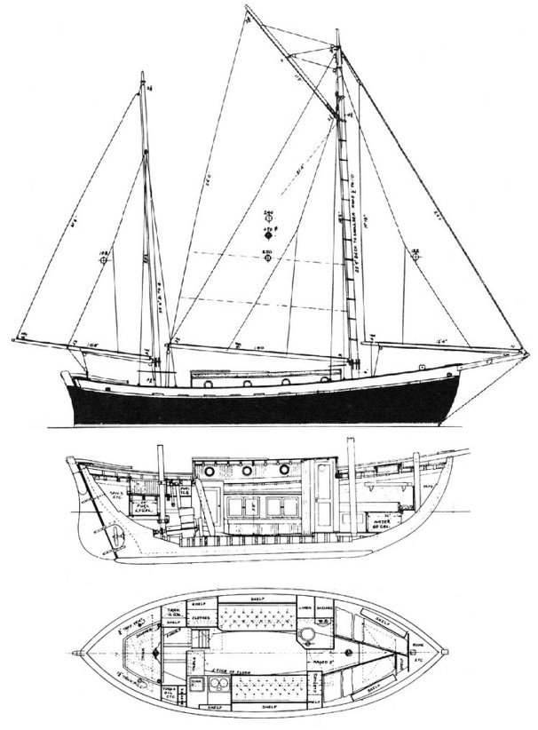 Plans for the TAHITI KETCH first appeared in a 1935 issue of 'Mechanix Illustrated'. Since then, thousands have been built around the world. As can be expected, hull and rig dimensions vary widely.